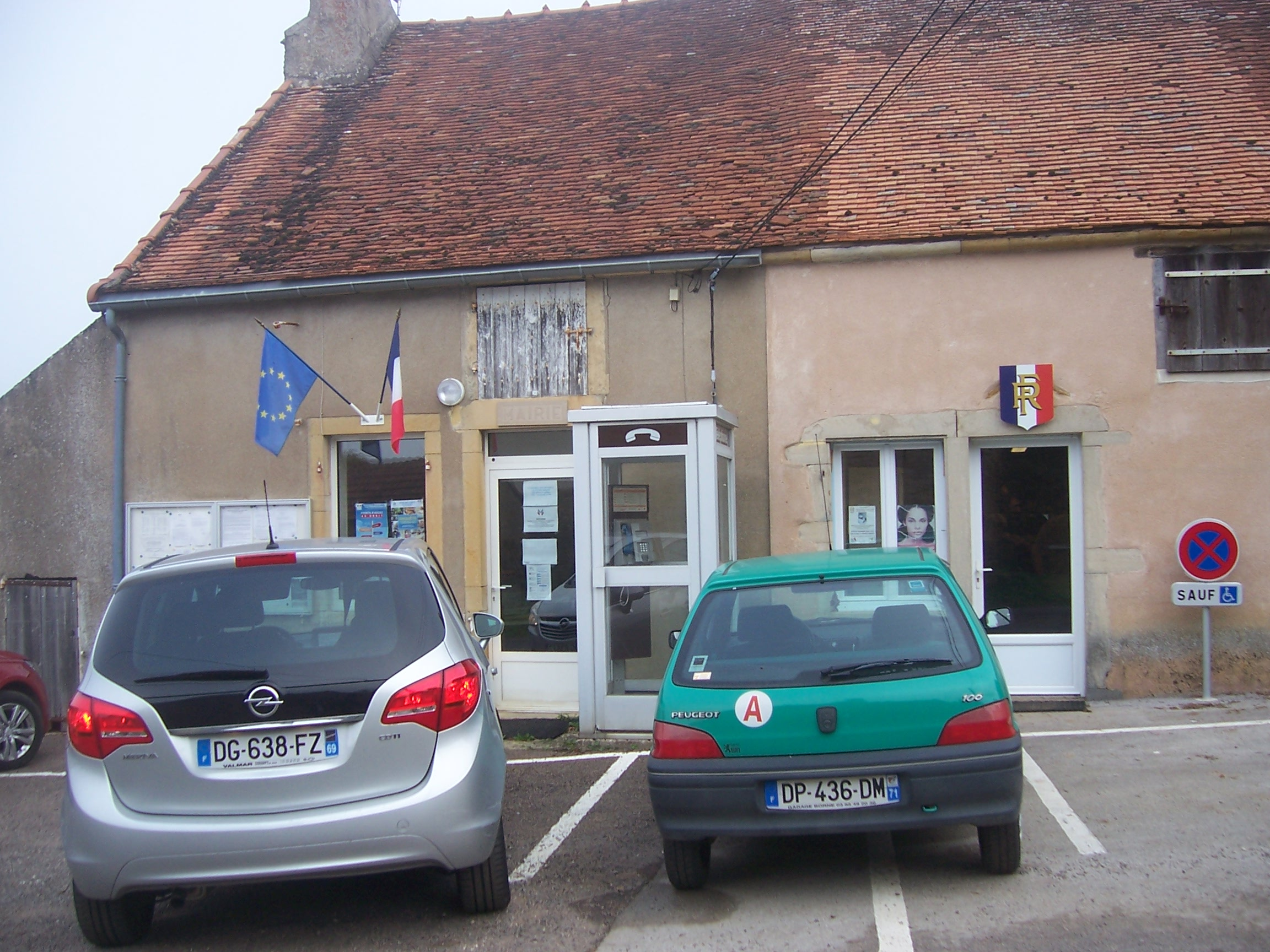 Maire de Saint-Privé